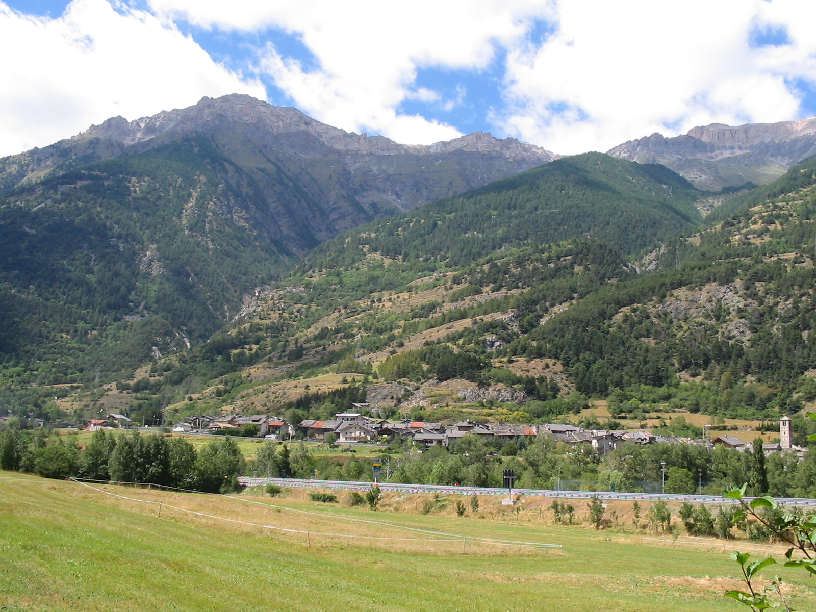 Salbertrand, Torino, Italia